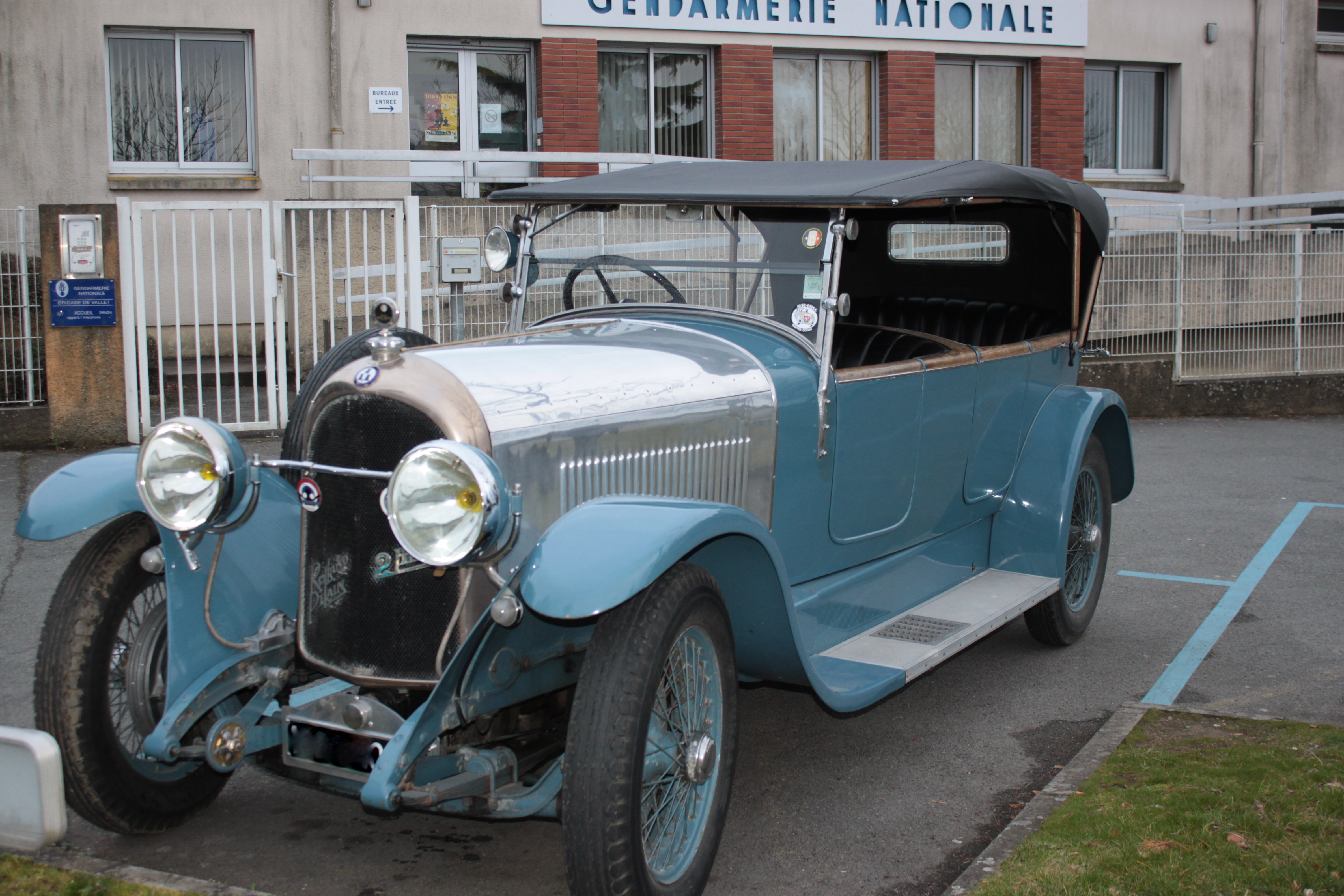 Rolland-Pilain 2 Litres.